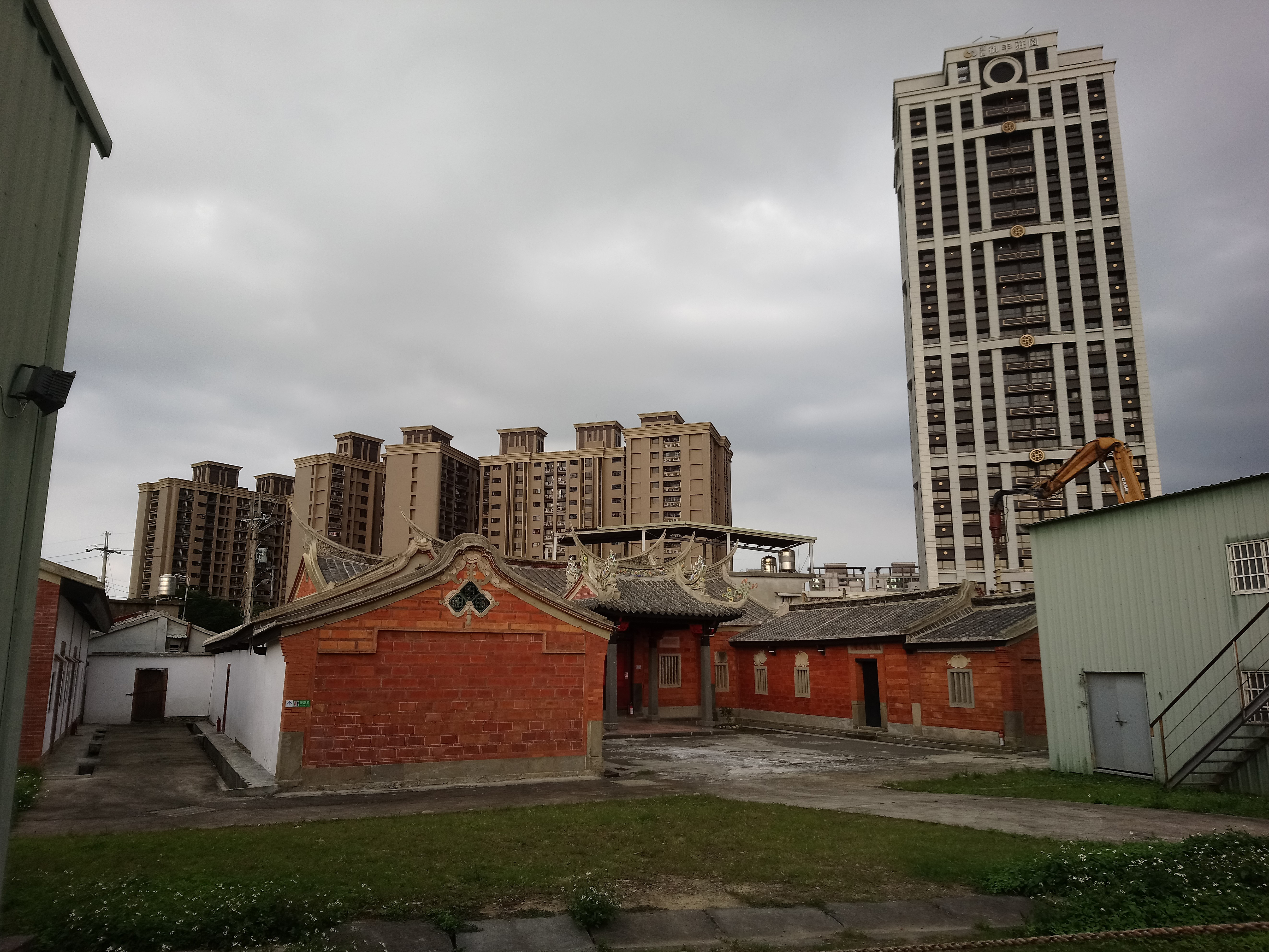 八德呂宅著存堂,桃園市八德區興仁里